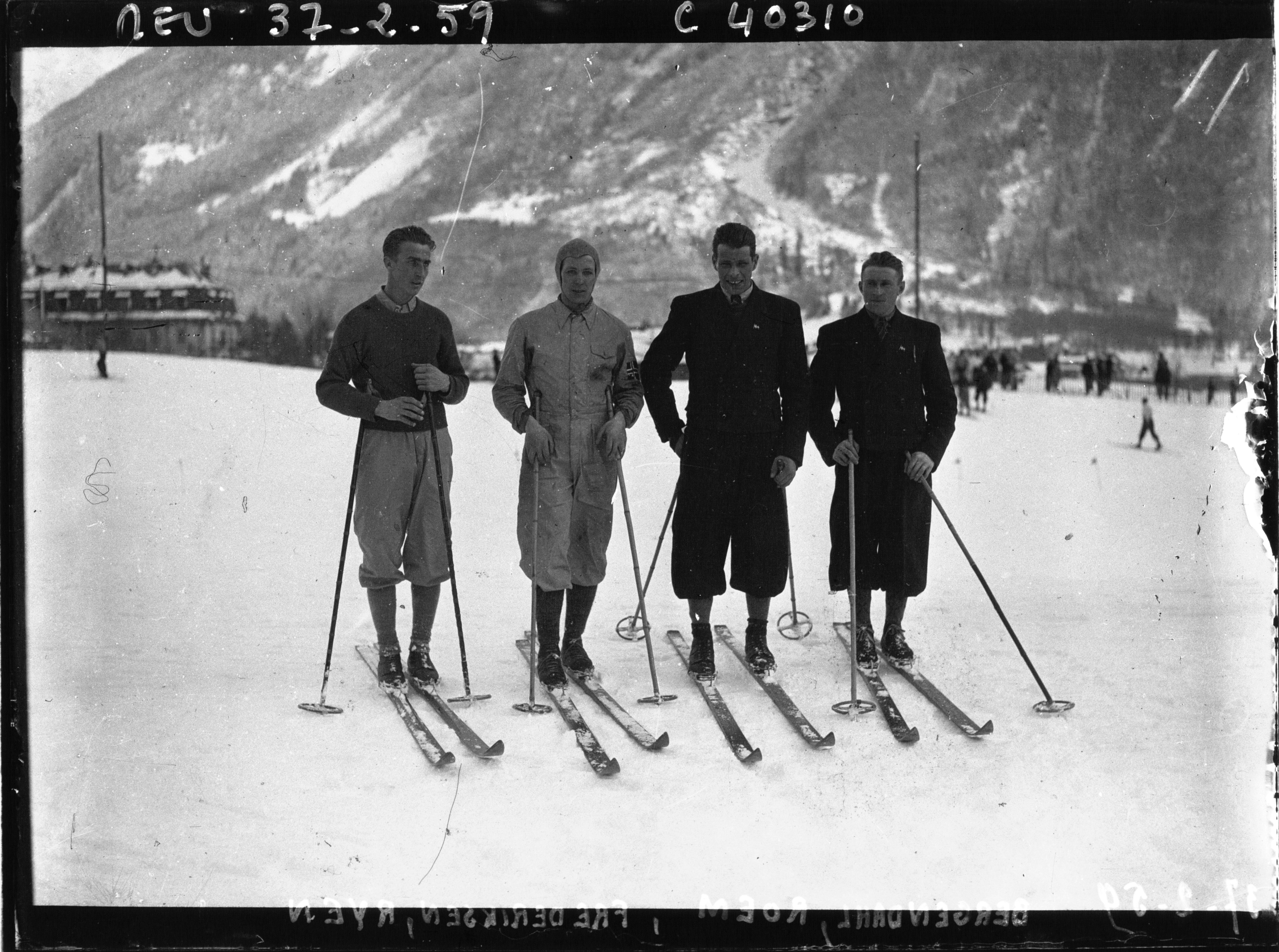 Chamonix : l'équipe norvégienne gagnante de la course de relais à ski : de gauche à droite, A. Ryen, Fredericksen, Røen, Bergendahl : [photographie de presse] / Agence Meurisse